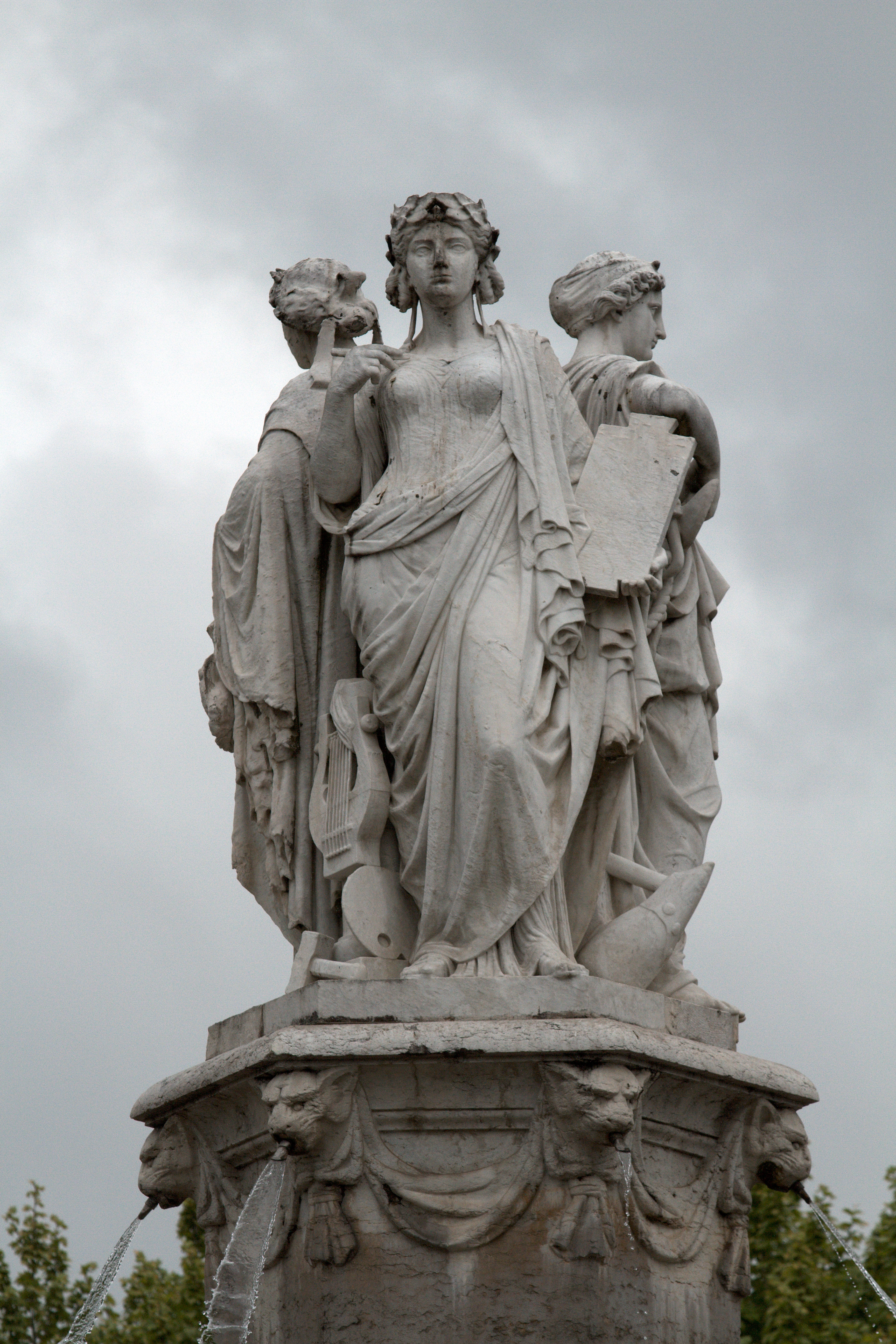 Fontaine de la Rotonde, Aix-en-Provence (France).